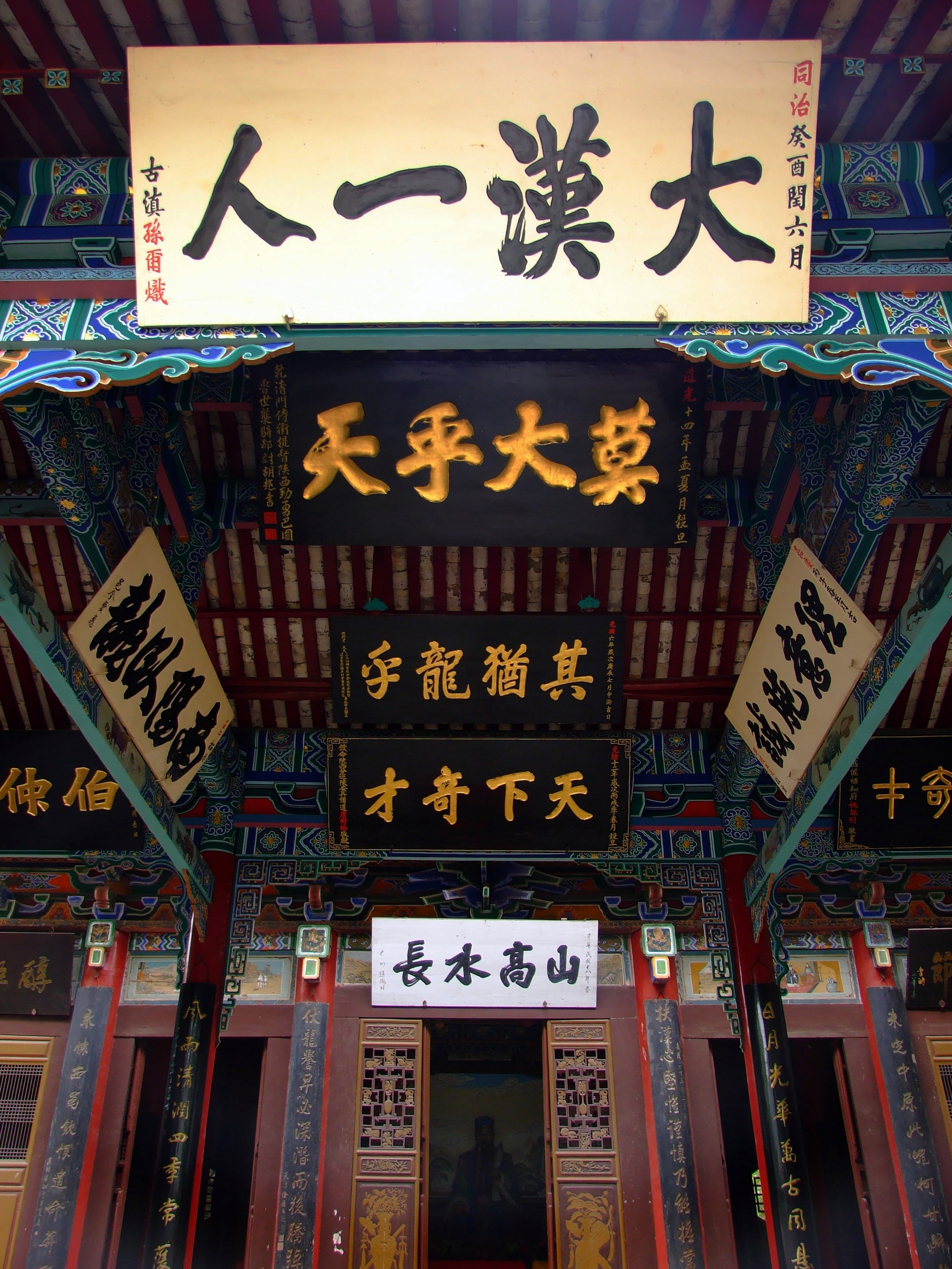 汉中武侯祠内的题匾